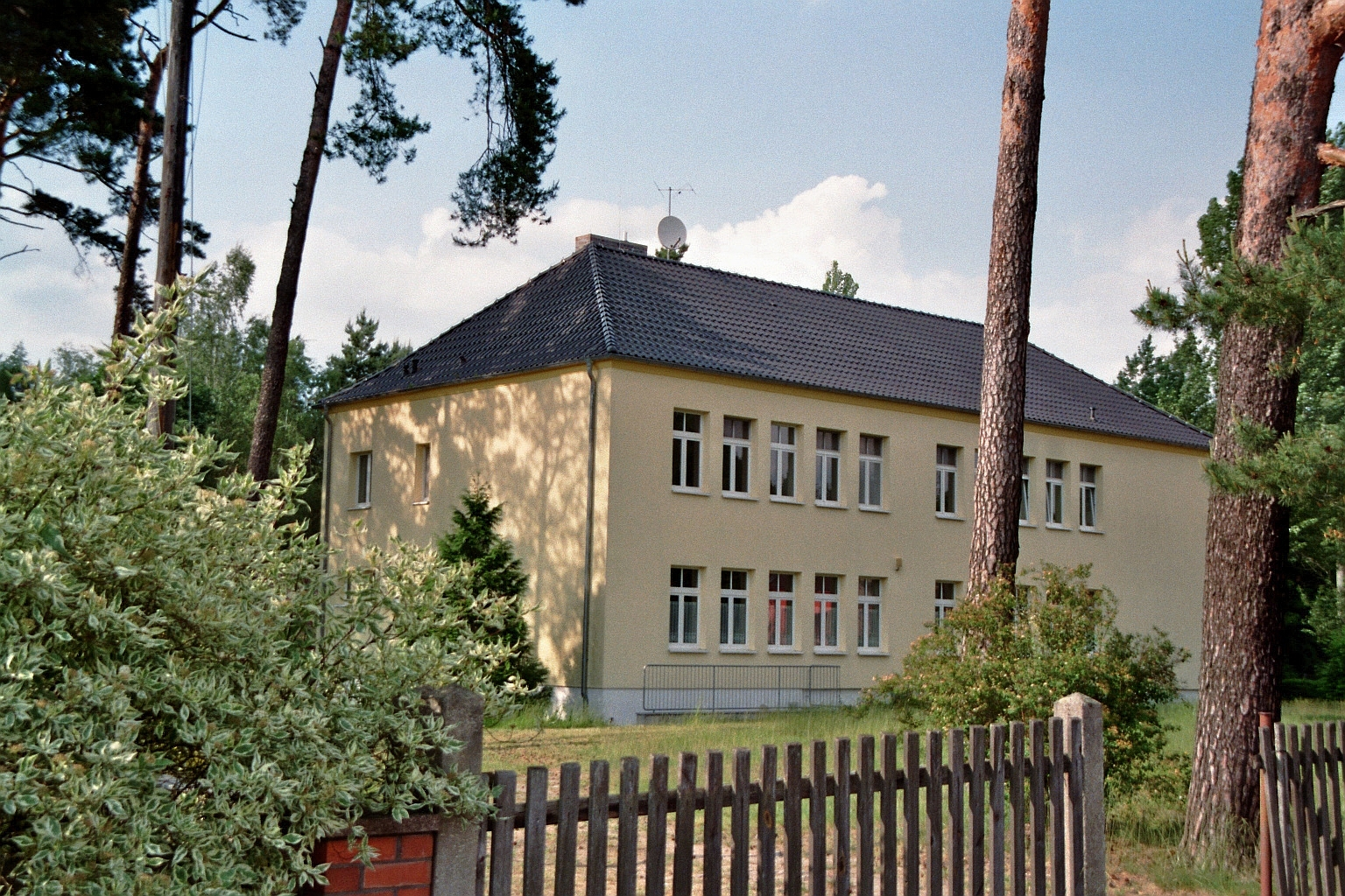 Dorfgemeinschaftshaus Jamlitz in Jamlitz, Amt Lieberose/Oberspreewald, im Landkreis Dahme-Spreewald in Brandenburg, Deutschland.